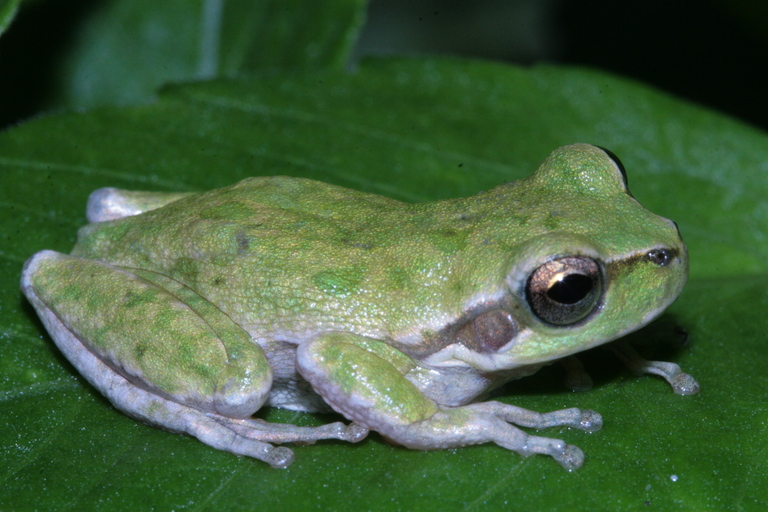 Hyla sarda